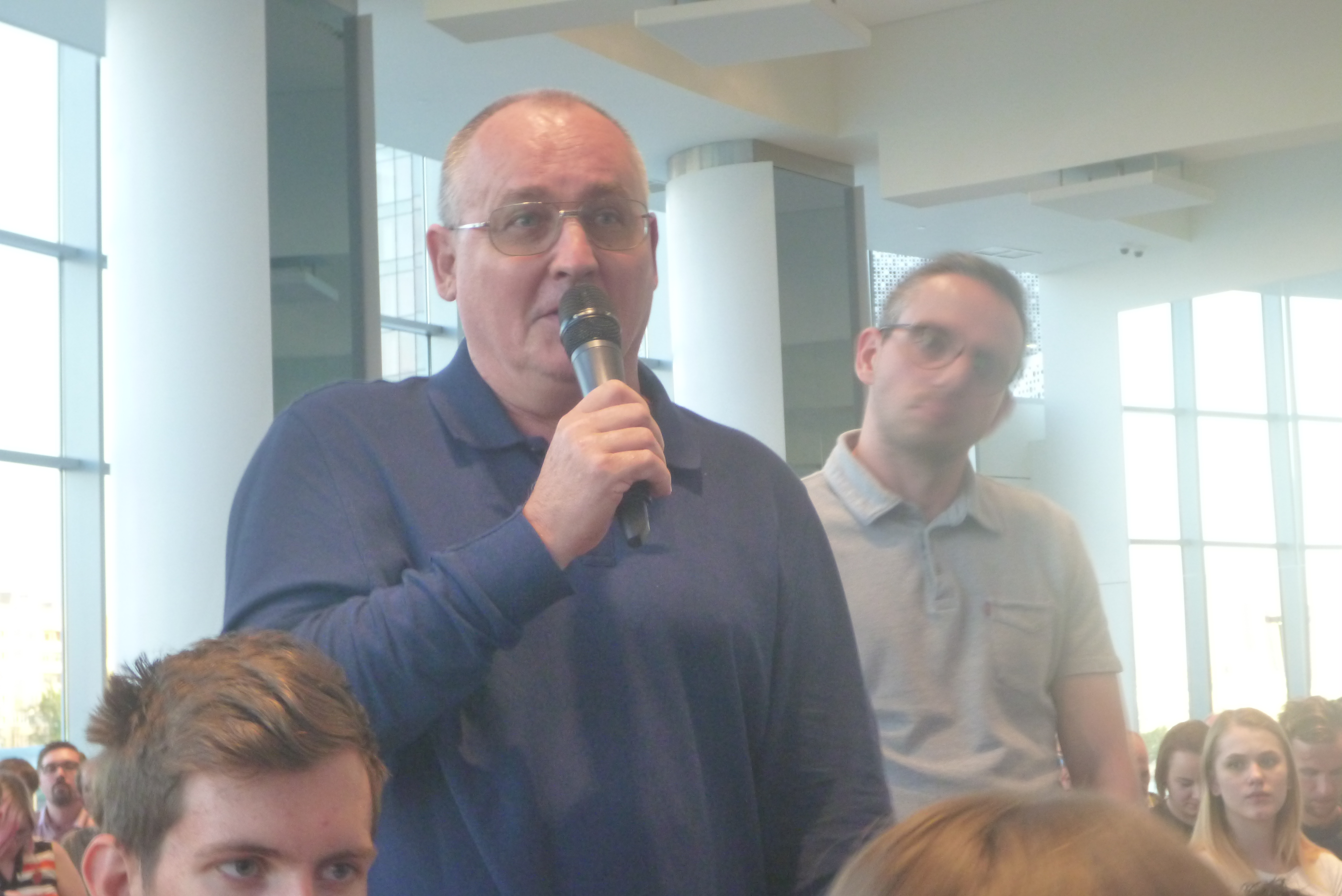 Юрий Глазков бывший главред Областной газеты в Ельцин-центре 30 мая 2019 года